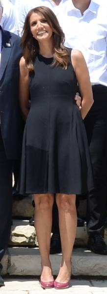 נשיא מדינת ישראל ראובן ריבלין עם שתי הקבוצות המשתתפות במשחק אלוף האלופים, מכבי חיפה והפועל באר שבע.